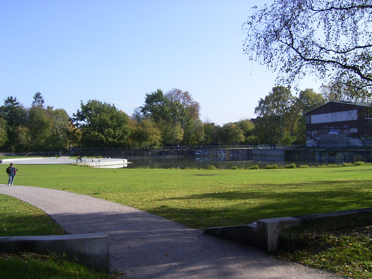 Grünanlage im Wendebecken der ehemaligen Schiffbauversuchsanlage in Hamburg-Barmbek-Nord